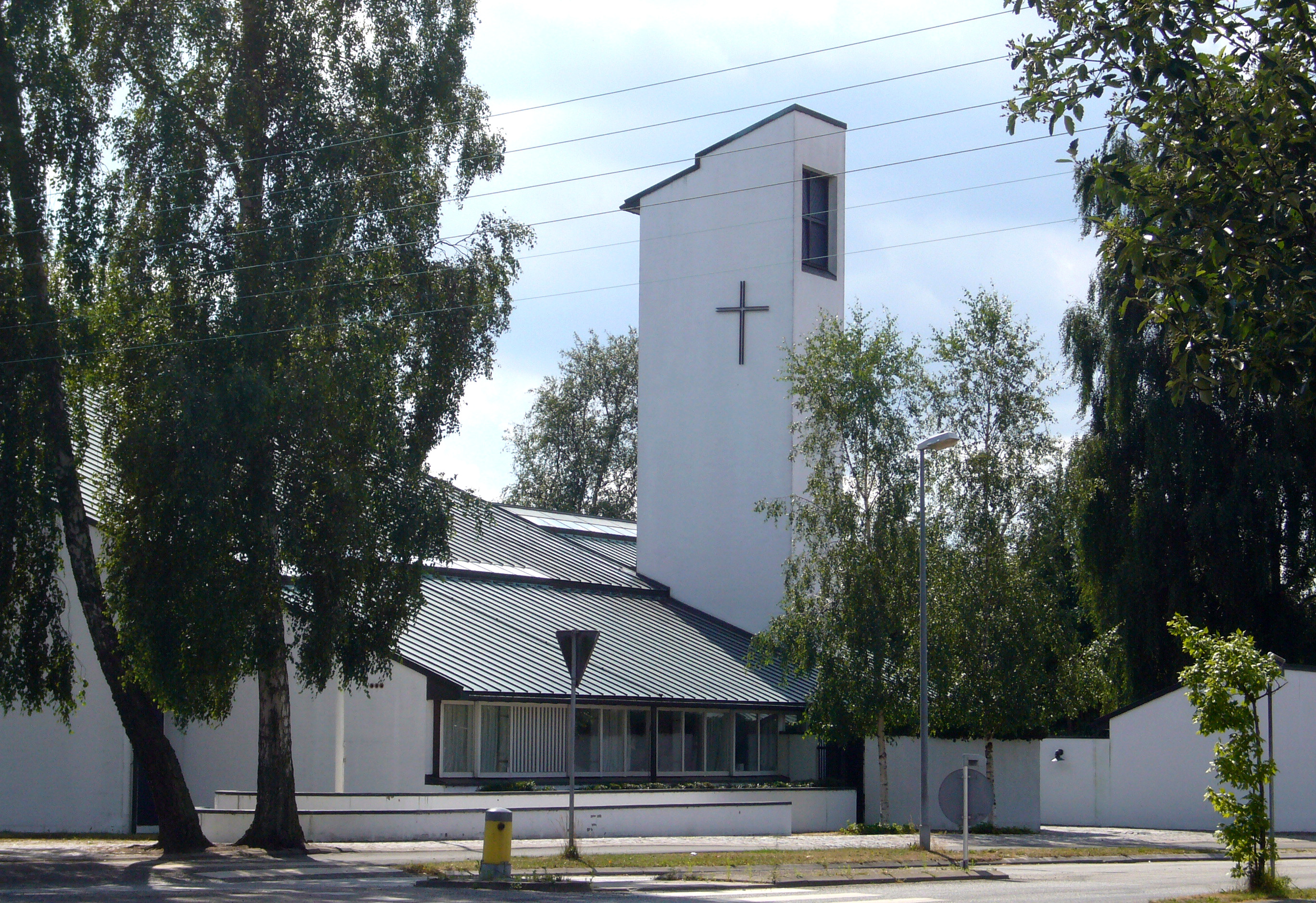 Solrød Strandkirke, Roskilde County, Denmark.